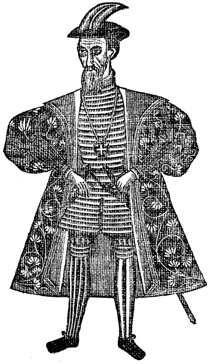 D. Pedro Mascarenhas vice-roi de l'Inde Portugaise